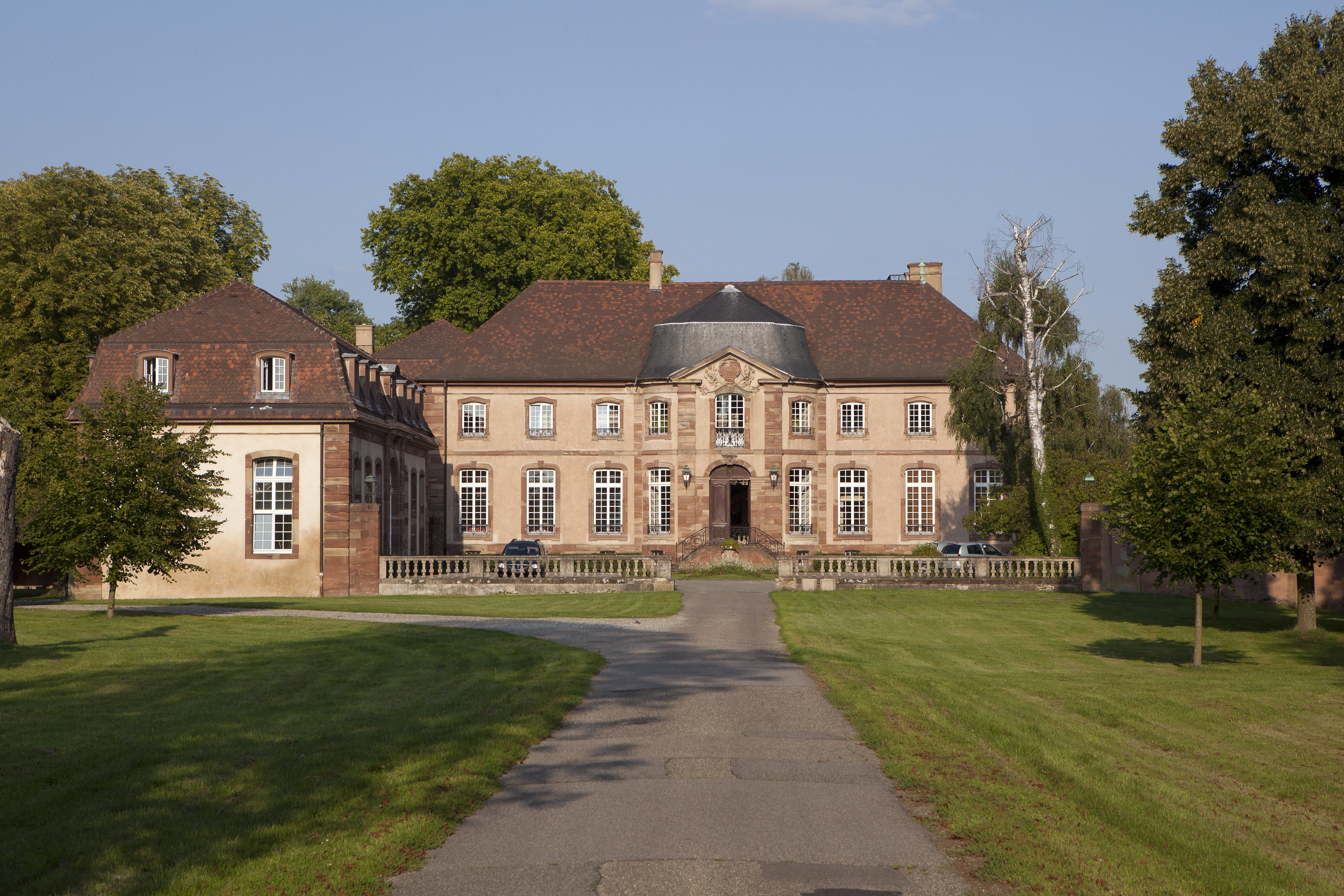 Château de la Cour d’Angleterre à Bischheim, Alsace, France